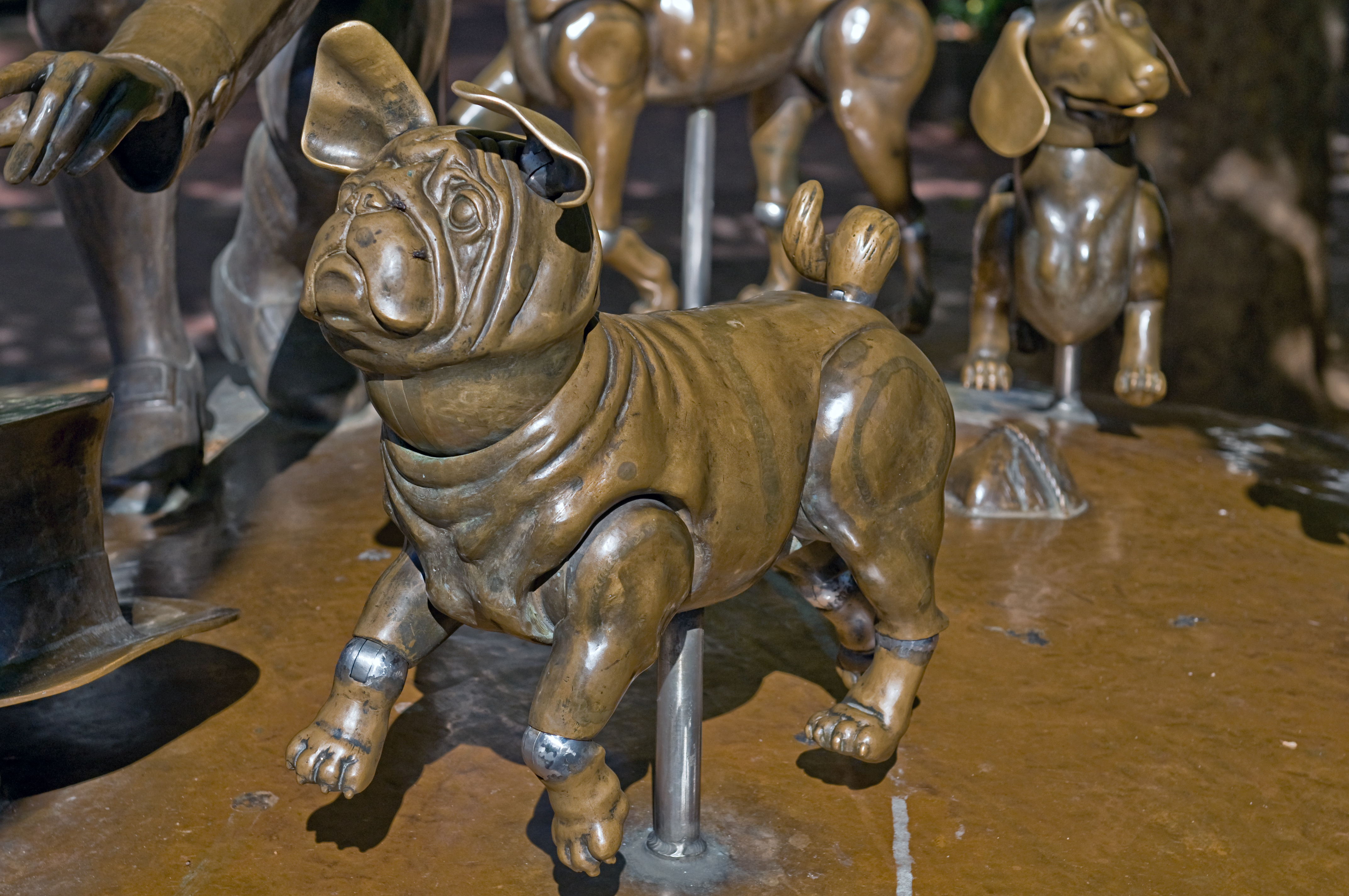 Krieh die Kränk, Offebach! Skulpturengruppe von Bonifatius Stirnberg in der Offenbacher Innenstadt, gestiftet von der Apotheke zum Löwen Detail: Bulldogge